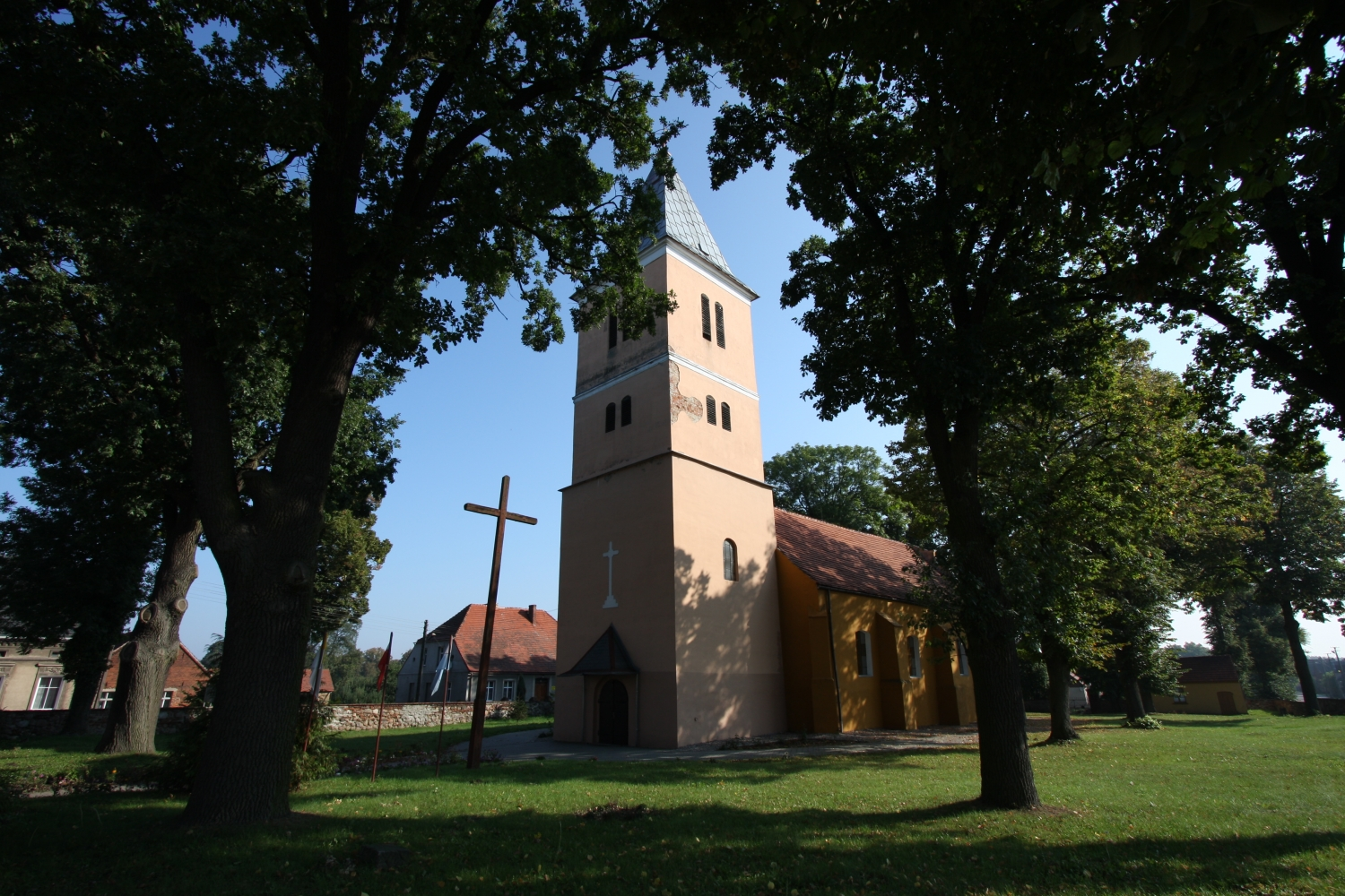 Kaława, kościół par. p.w. św. Mikołaja, mur., 1668-1699, XIX